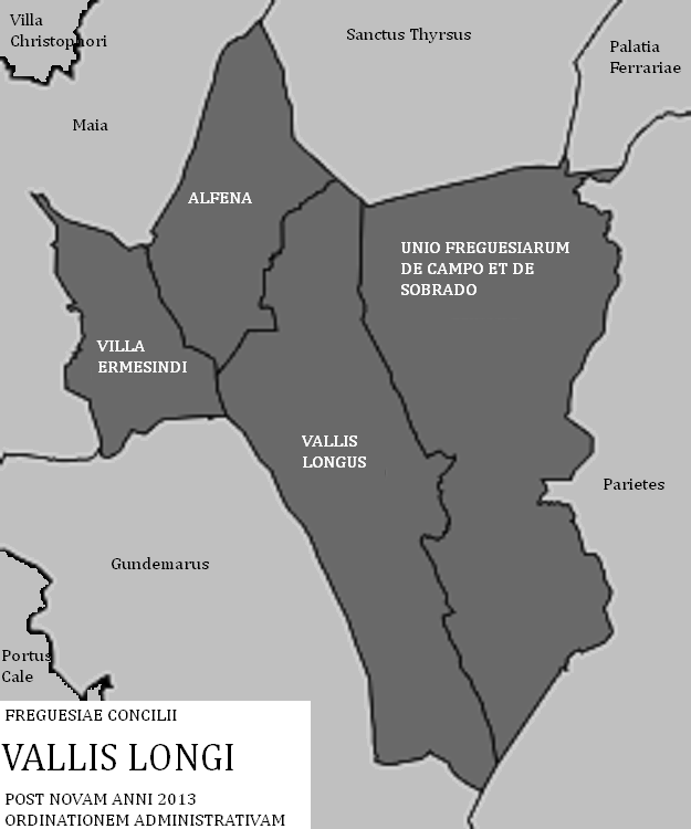 Concilii Vallis Longi freguesiae post novam ani 2013 ordinationem administrativam